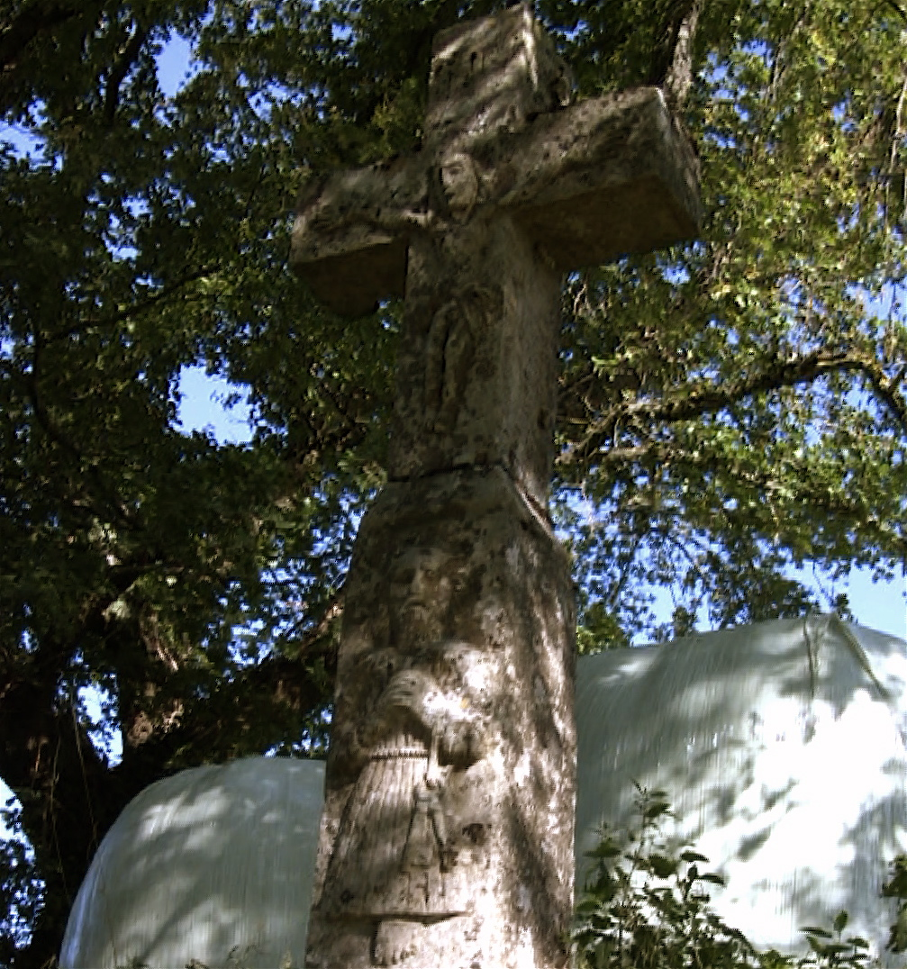 Croix de Saint Pierre, Pomayrols (Aveyron-France)